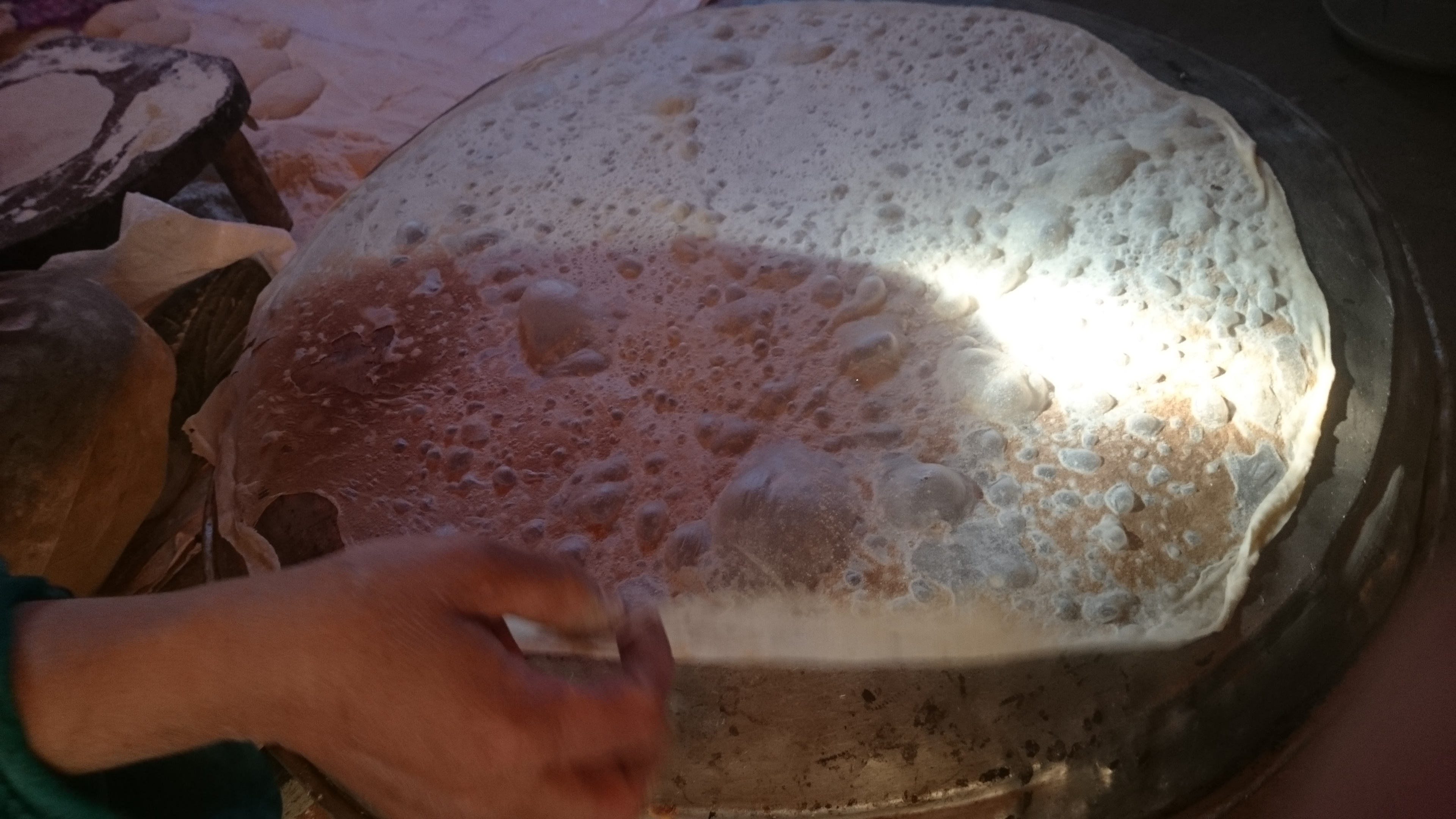 تصویری از پختن نان ساجی کردی (نان ایرانی) بر روی ساج، گرم و تازه! (مکان: روستای کلور در شهرستان جوانرود از توابع استان کرمانشاه.)